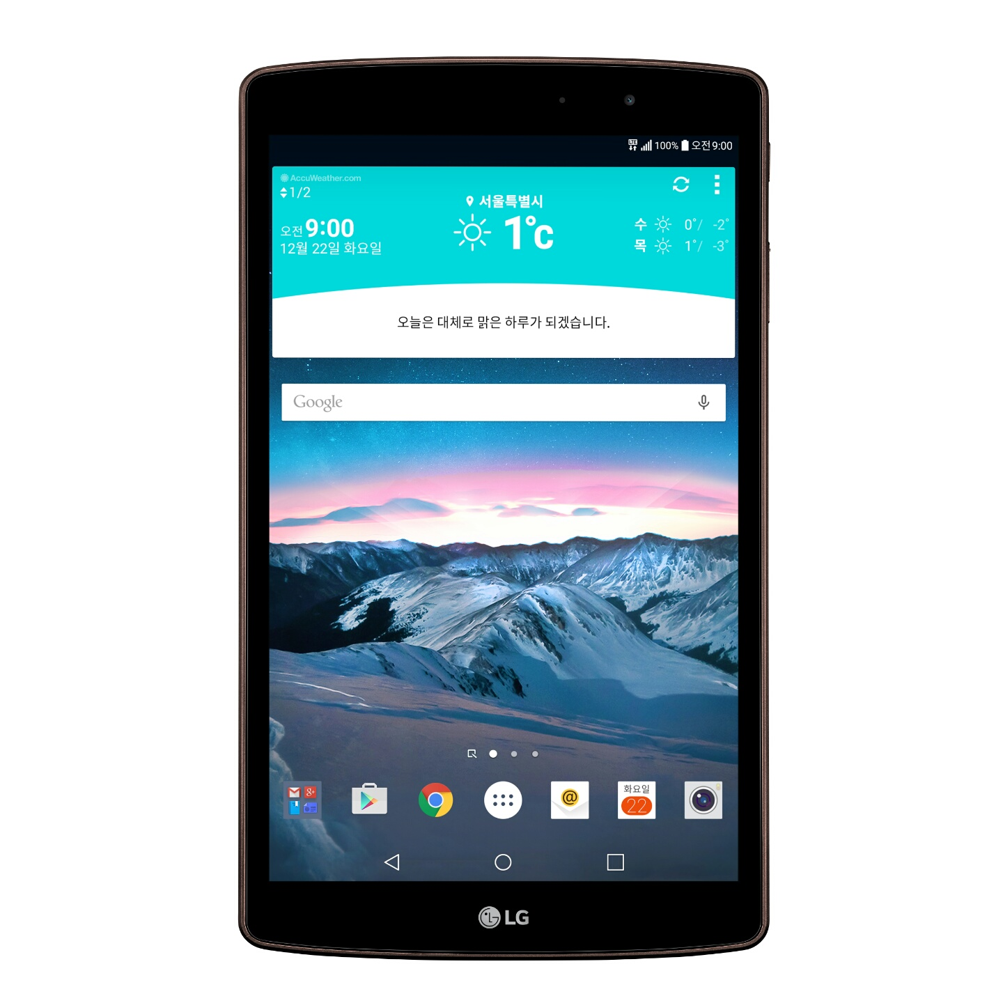 LG전자, ‘G패드 Ⅱ 8.3 LTE’ 태블릿 출시 ■ 와이파이 없는 환경에서도 인터넷 접속 가능 ■ 풀HD급 해상도로 동영상 감상, 전자책 읽기 등에 적합 ■ 표준 USB 포트 적용해 PC의 편리함을 그대로 구현 ■ LG 유플러스 통해 23일 국내 출시 ※ Social LG전자 ( 에서 관련 보도자료를 확인하실 수 있습니다.